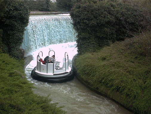 Rapid River Schlumpf-Park Frankreich